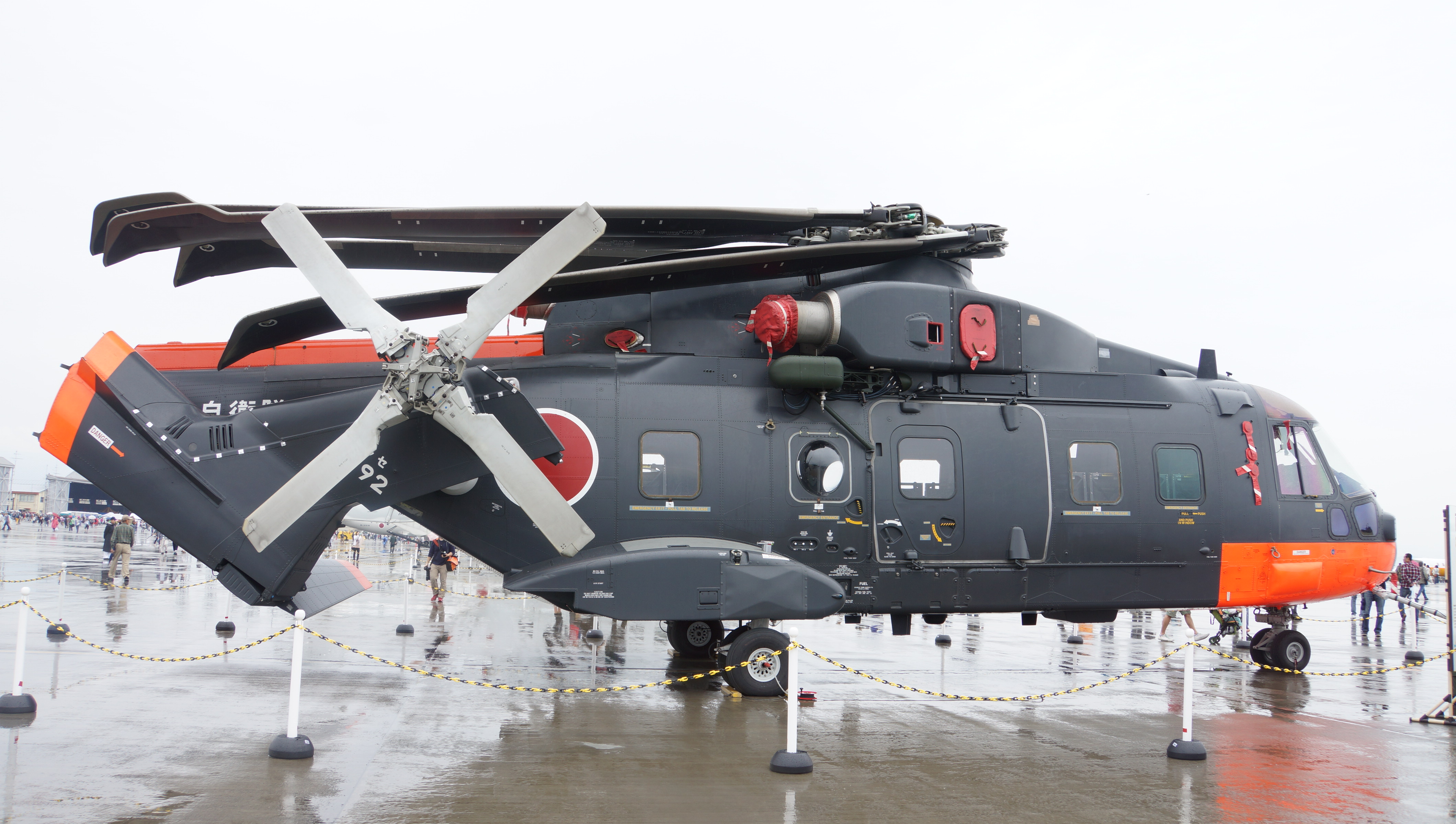 海上自衛隊 CH-101南極観測支援用ヘリコプター（8192号機） 右側面。 2015年5月3日 岩国航空基地にて。